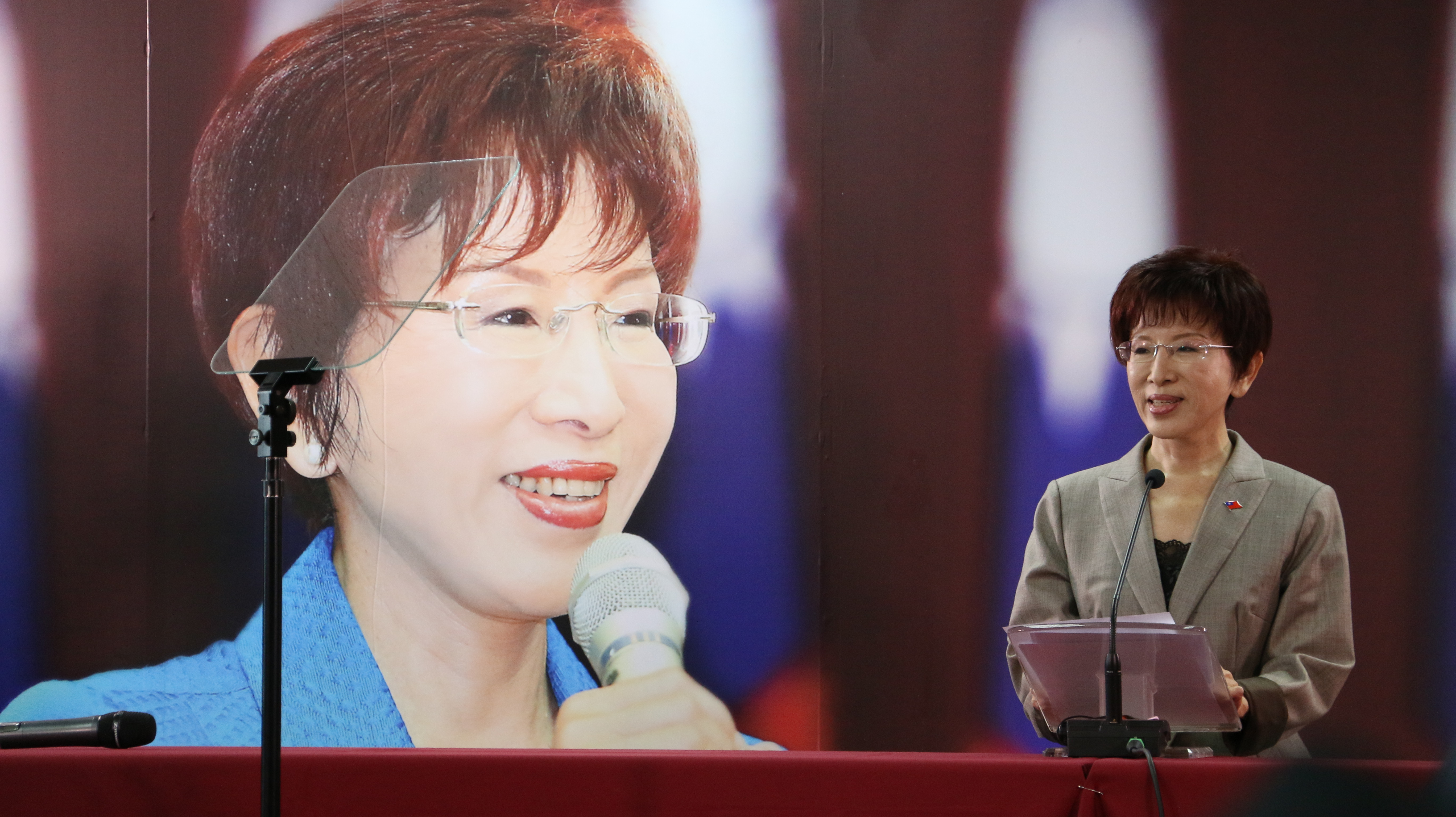 中文（台灣）: 洪秀柱召開記者會回應“換柱說”。（照片來源：美國之音李逸華拍攝）